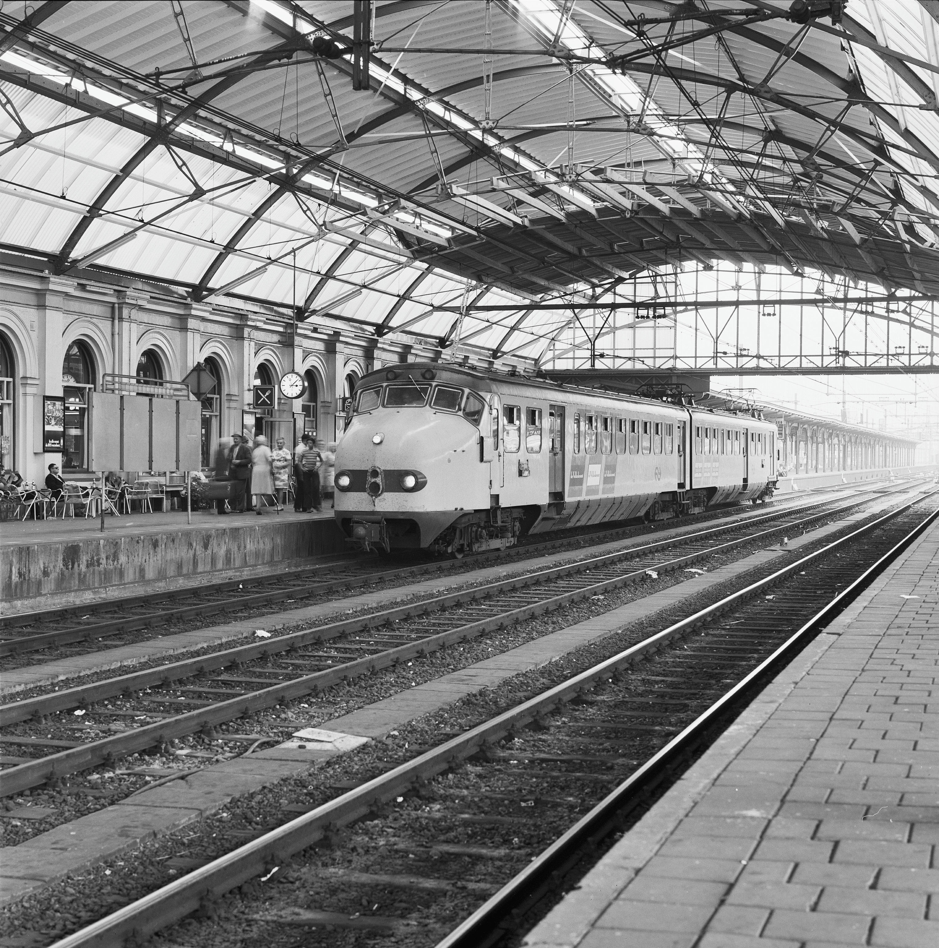 Station N.S.: perronzijde